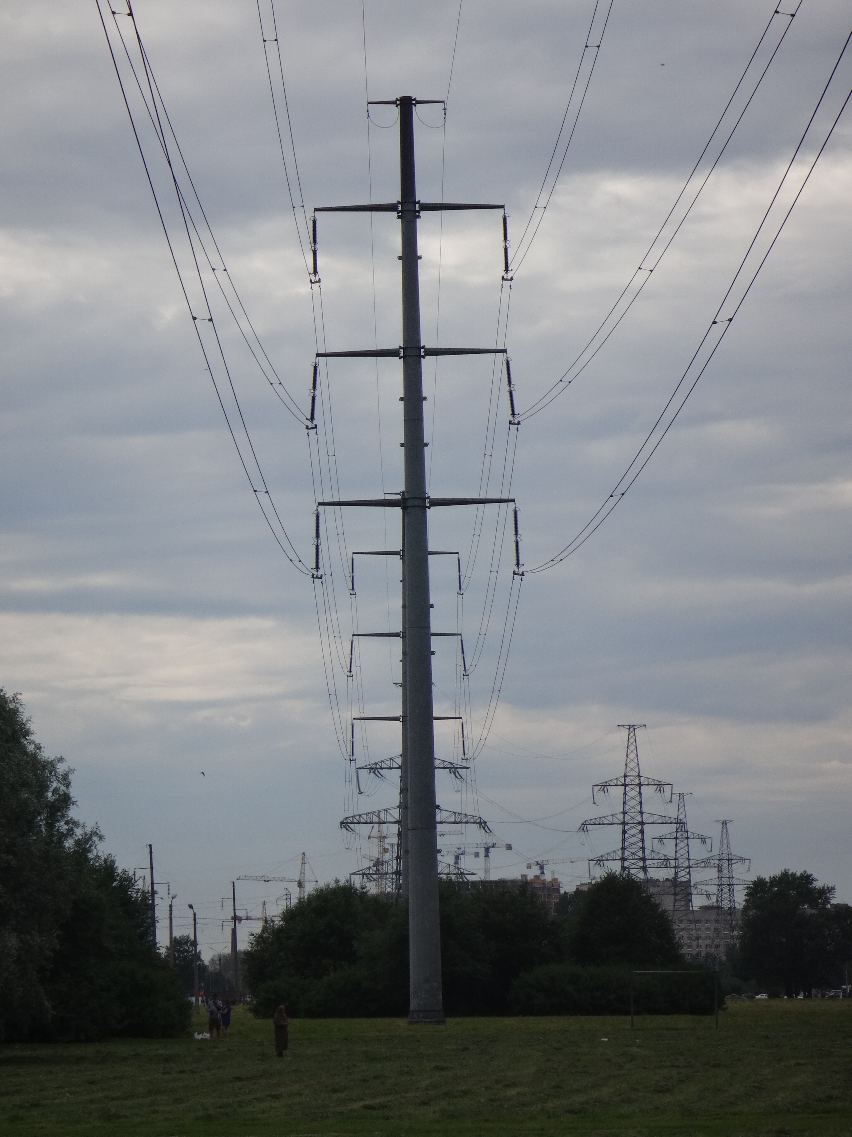 Трубчатая опора ЛЭП. ЛЭП напряжением 220 кВ в Санкт-Петербурге